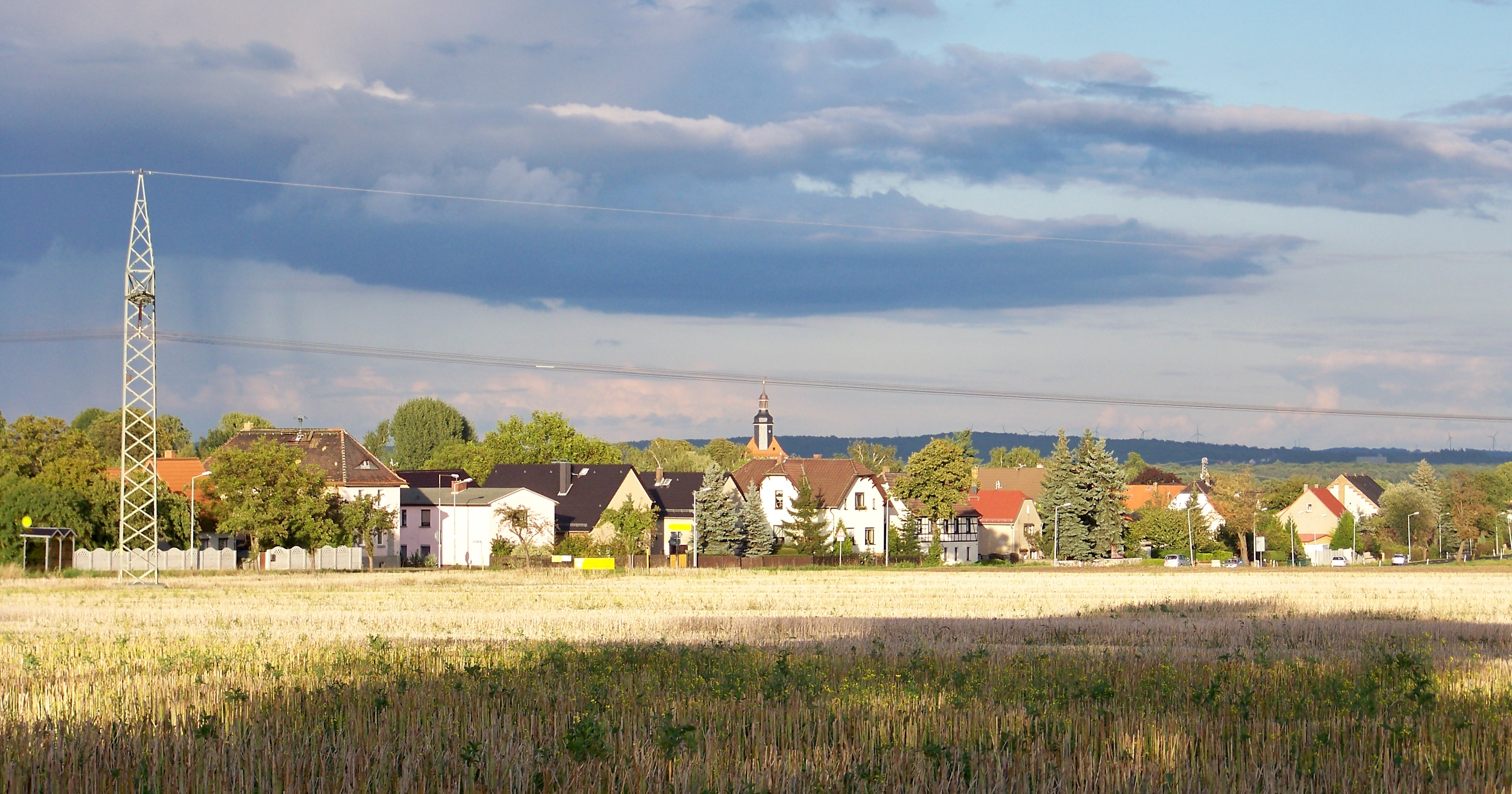 Ansicht des Ortes Threna (Gemeinde Belgerhain) im Landkreis Leipzig